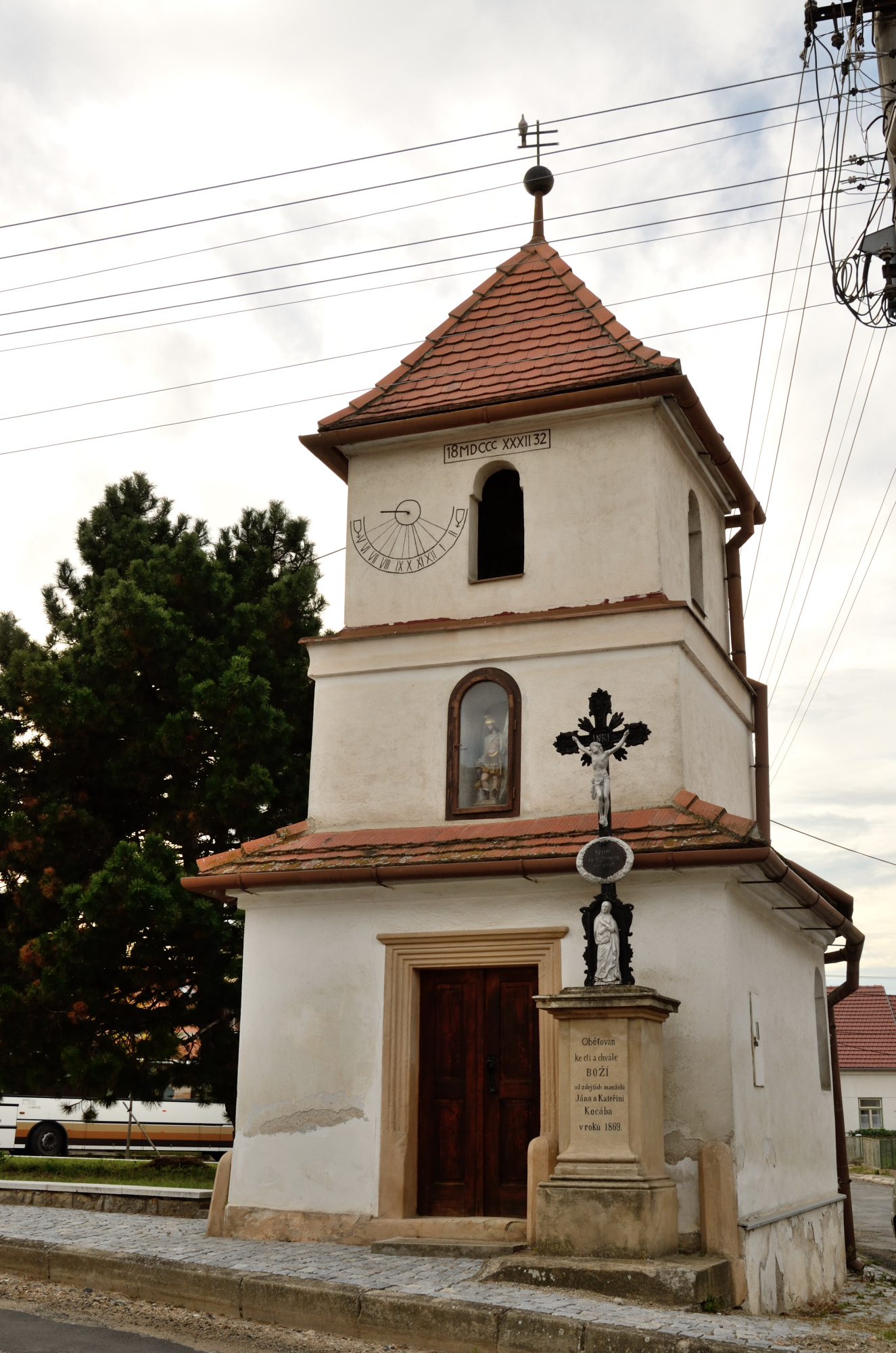 Kaple P. Marie (Hrubšice), Hrubšice